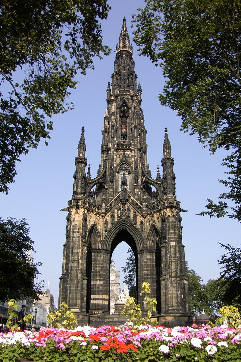 Am 1.August 2004 habe ich dieses Bild in Edinburgh, der Hauptstadt von Schottland gemacht. Es zeigt das Sir Walter Scott Monument.